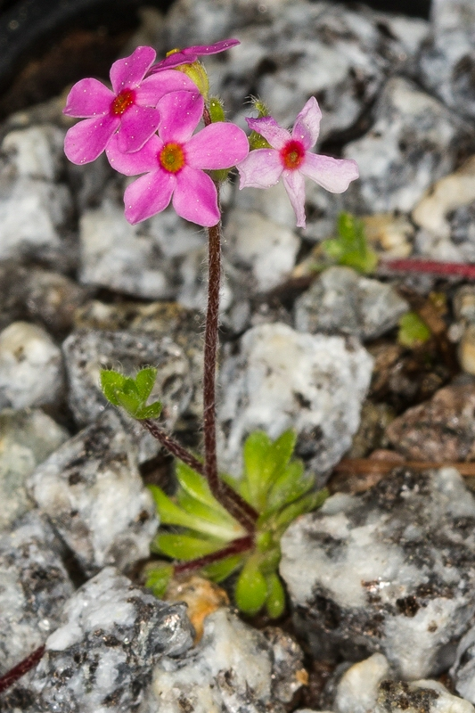 Arktisch-alpiner Garten Chemnitz: Mannsschild - Androsace minor